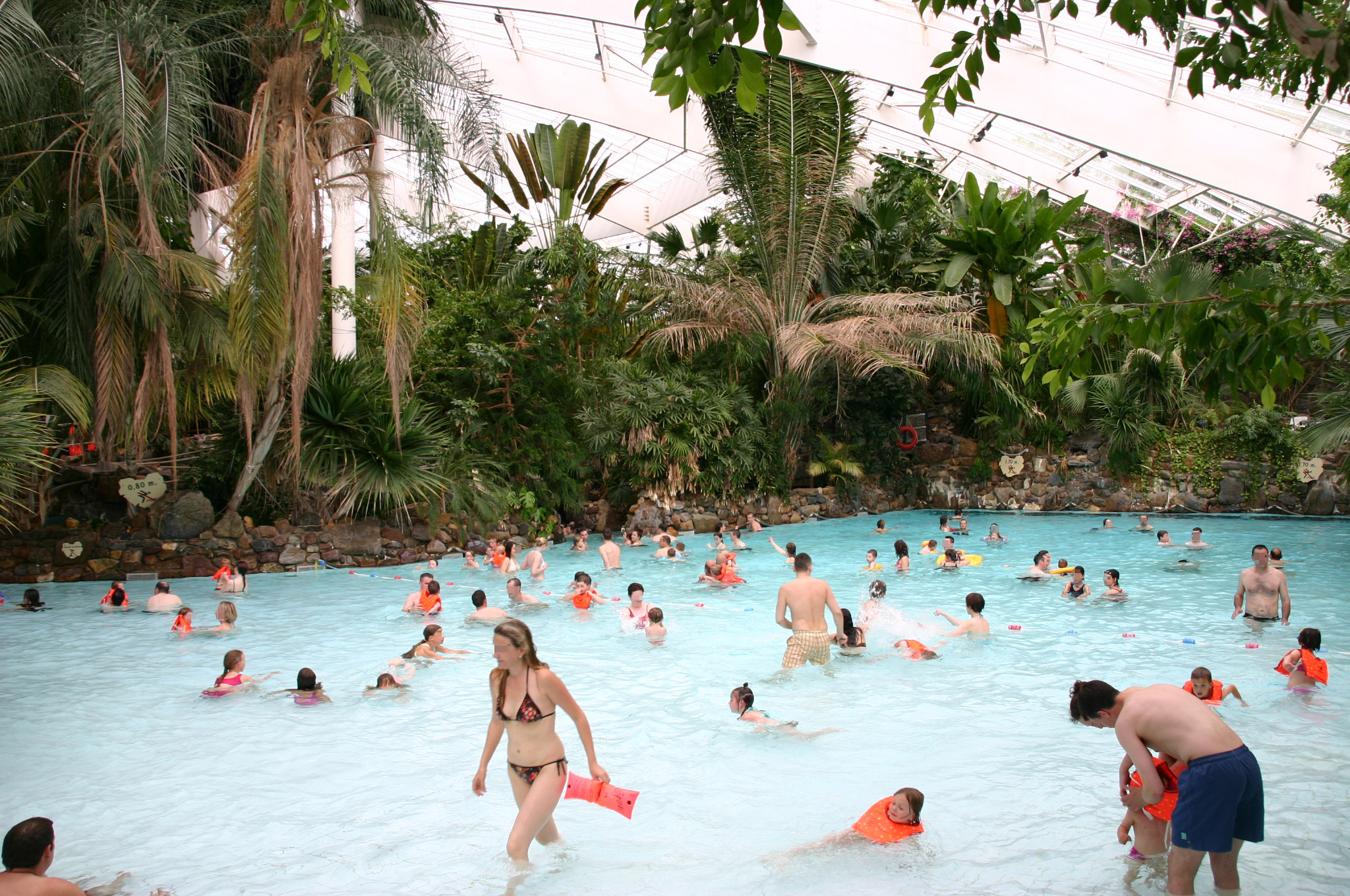 Centre aquatique du domaine "Les Hauts de Bruyères" à Chaumont-sur-Tharonne / Loir-et-Cher / France